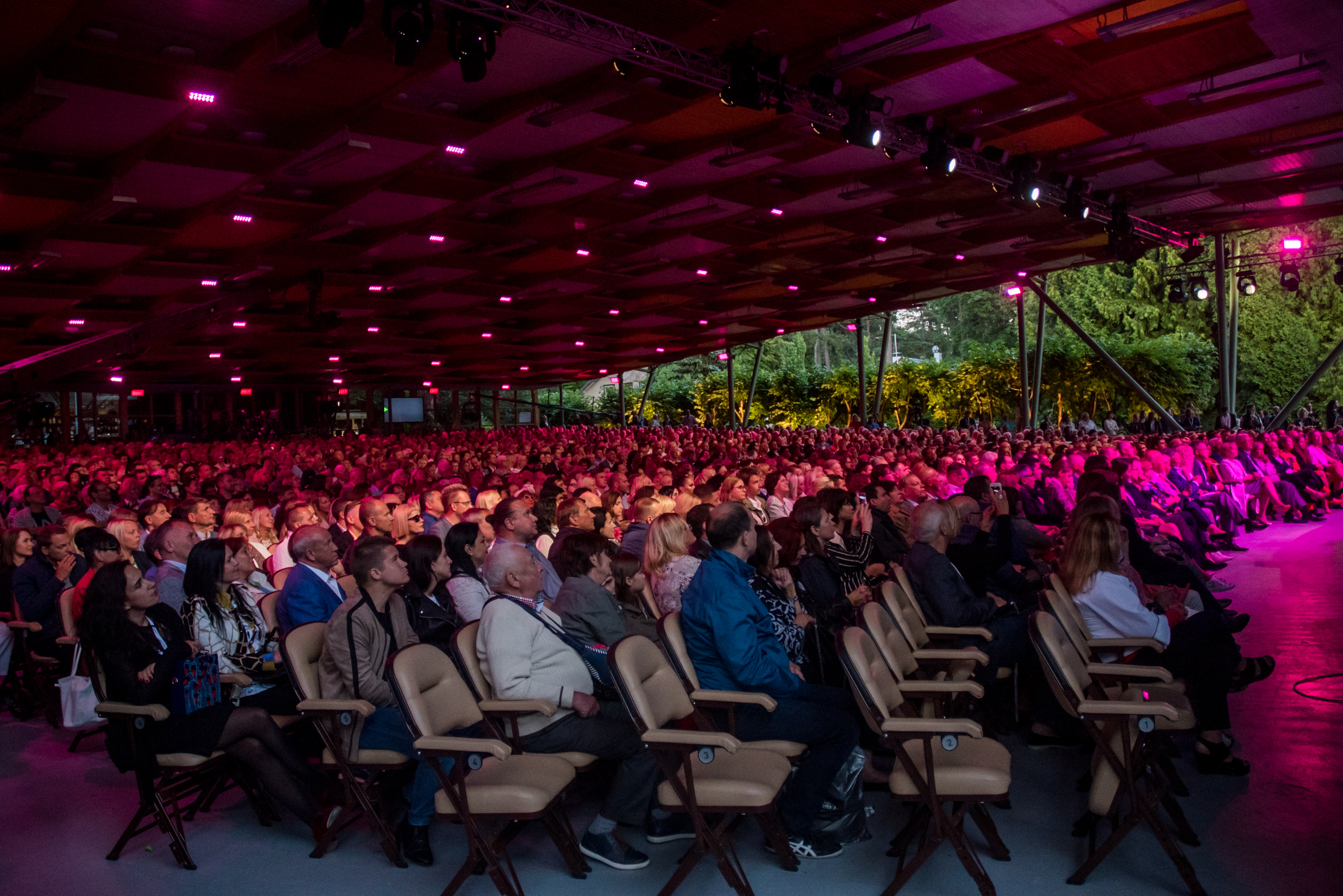 Зрители на фестивале «Лайма. Рандеву. Юрмала 2017»